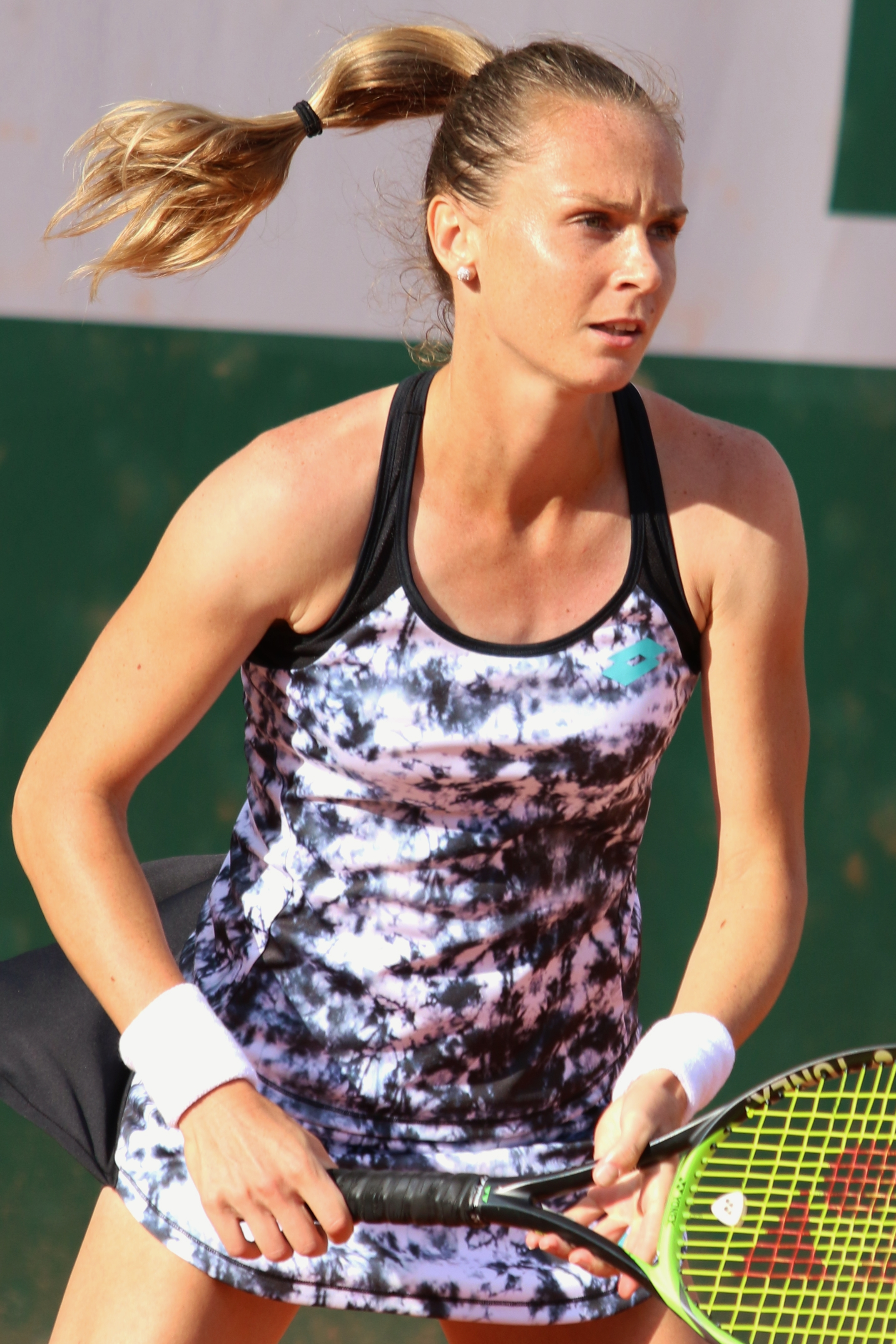 Rybarikova RG18 (5)